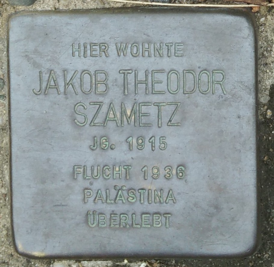 Bad Vilbel, Stolperstein Jakob Theodor Szametz